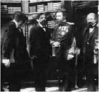 Frame from Independenţa României film (1912). The council. From left to right: M. Vîrgolici (as Ion C. Brătianu), Aristide Demetriade (as king Carol I) and Ion Niculescu (as Mihail Kogălniceanu).